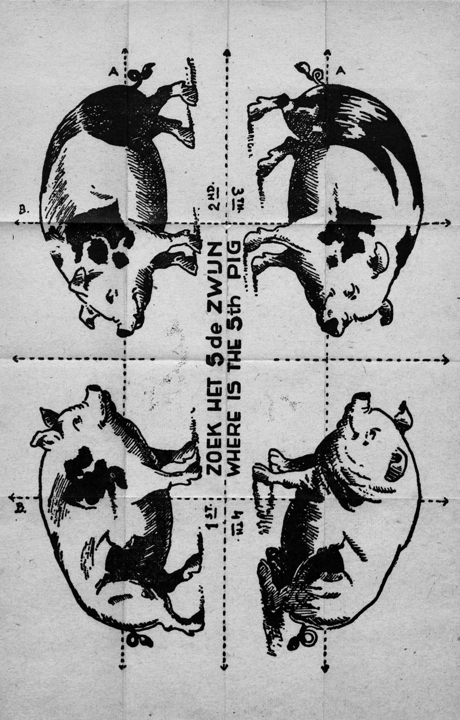 Zoek het 5de zwijn. Where is the 5th pig. Faltbilderrätsel. Kleinplakat. 1 Bl. Schwarzer Offsetdruck. 16 x 24,8 cm. Amsterdam (?) um 1940.